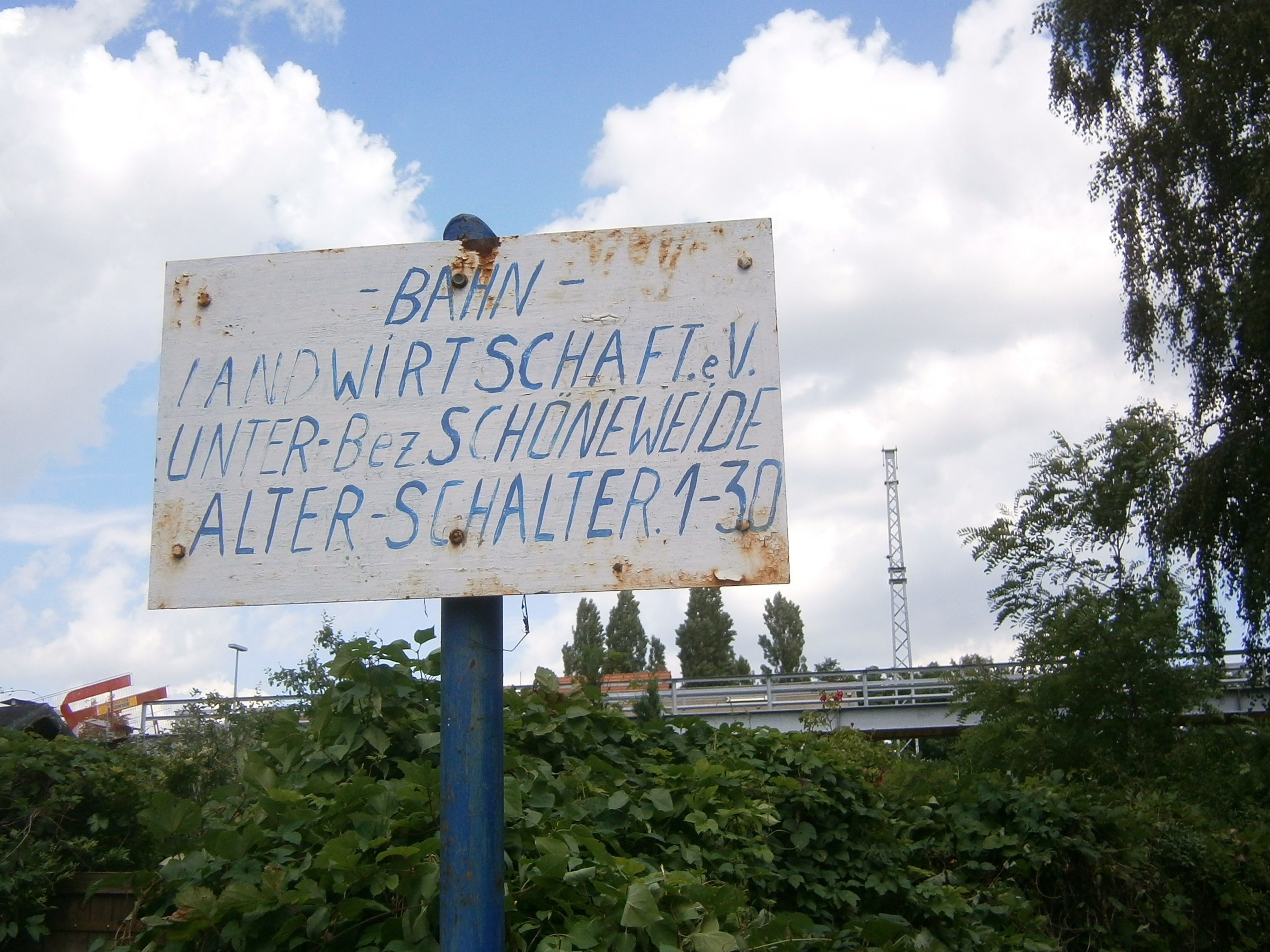 Schild der Kleingartenanlage Bahnlandwirtschaft Am alten Schalter in Berlin-Johannisthal nahe am Südwest-Ausgang des S-Bahnhofs Schöneweide. Schild am Schwarzen Weg.